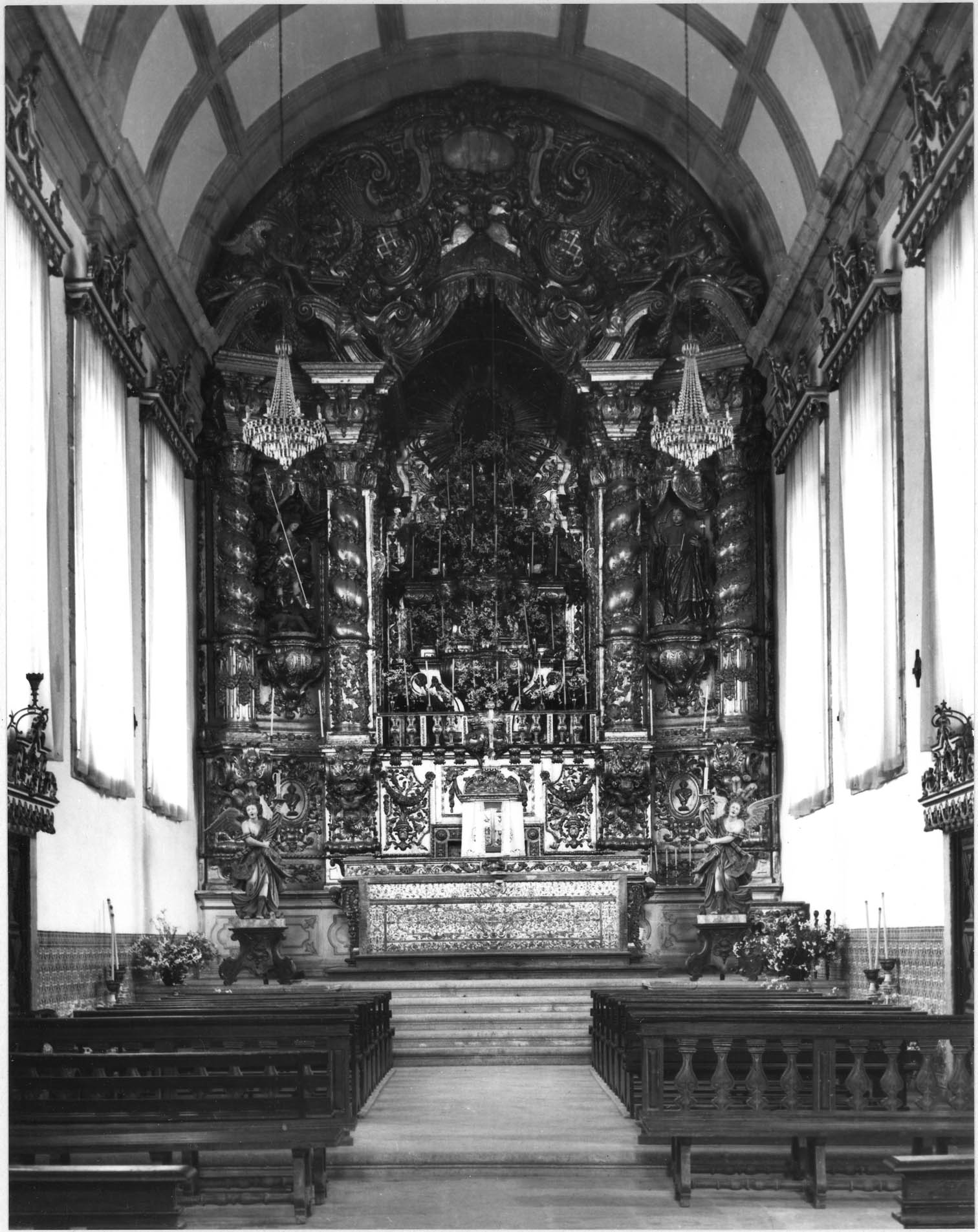 Capela-mor. Fotógrafo: Robert Chester Smith (1912-1975). Data de produção da fotografia original: 1962-1964. [CFT008.1220.ic]